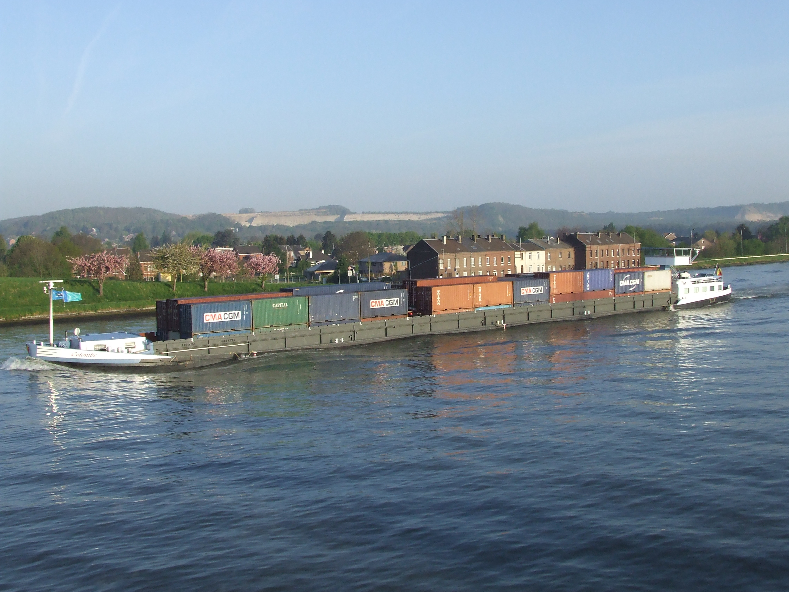 Barge à 3 niveaux de containers passant le canal Albert en direction du port de Renory